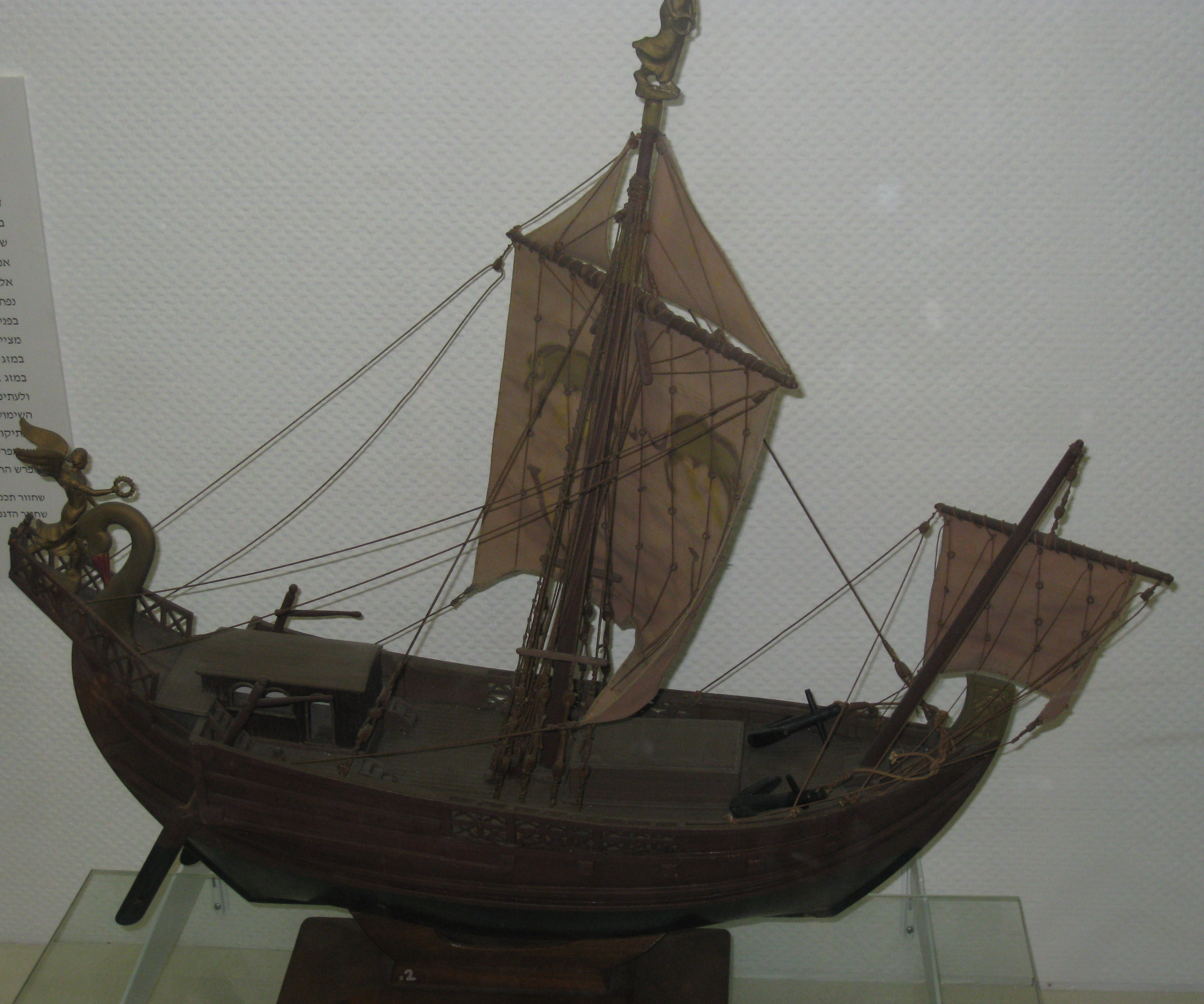 National Maritime Museum, Israel - Ship Models A modern model of a Roman marchent ship from 100 BC. wood. Model built by naval Architect M. Pliner and by I. Krupnik המוזיאון הימי הלאומי בחיפה דגמי ספינות דגם מודרני של ספינת סוחר רומית עתיקה. הספינה הפליגה מרומא לאכסנדריה והובילה דגן. ספינות מסוג זה היו בשימוש במאה הראשונה לפני הספירה. הדגם, מעשה ידי האדריכל הימי מ. פלינר ובידי י. קרופניק